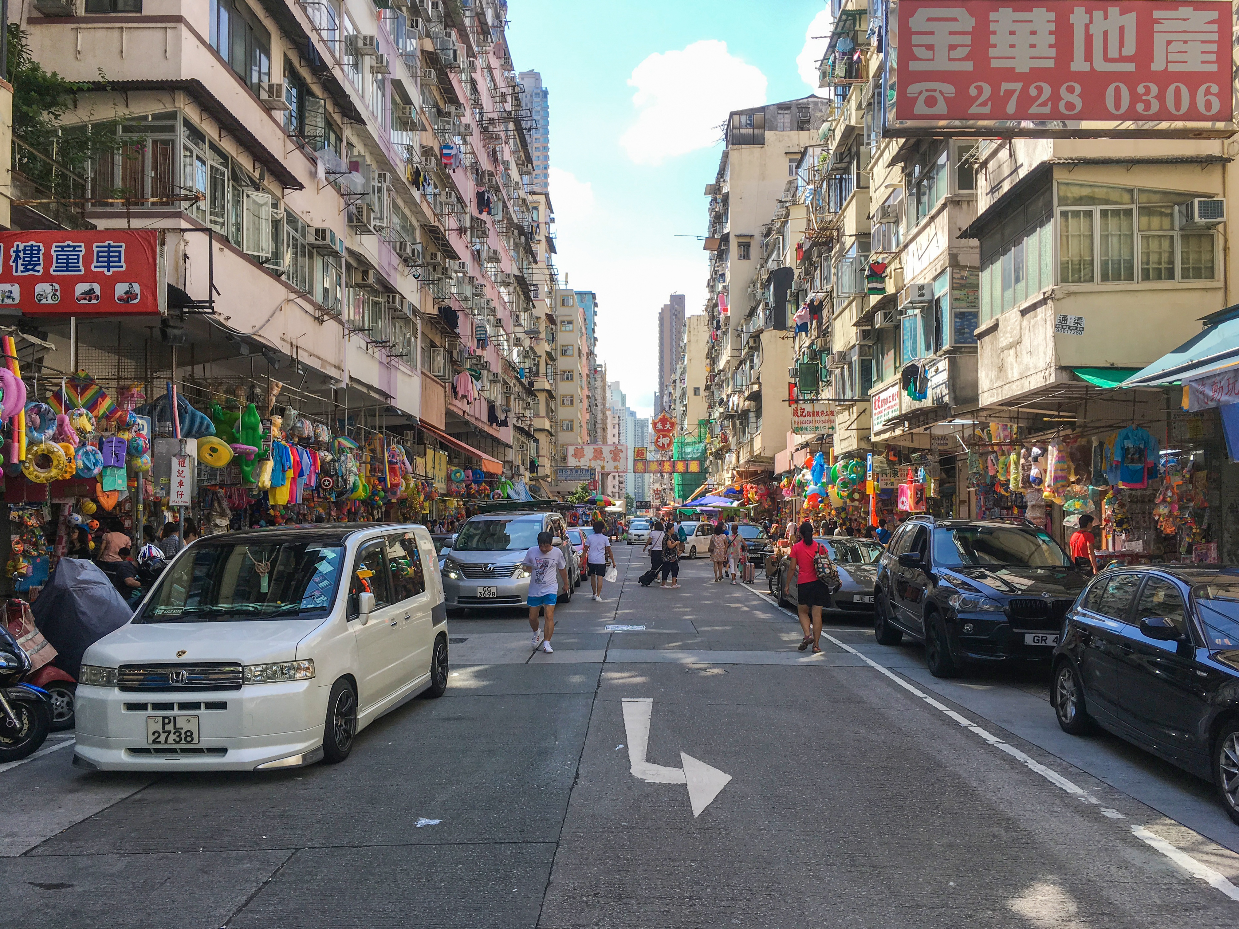 Fuk Wing Street_